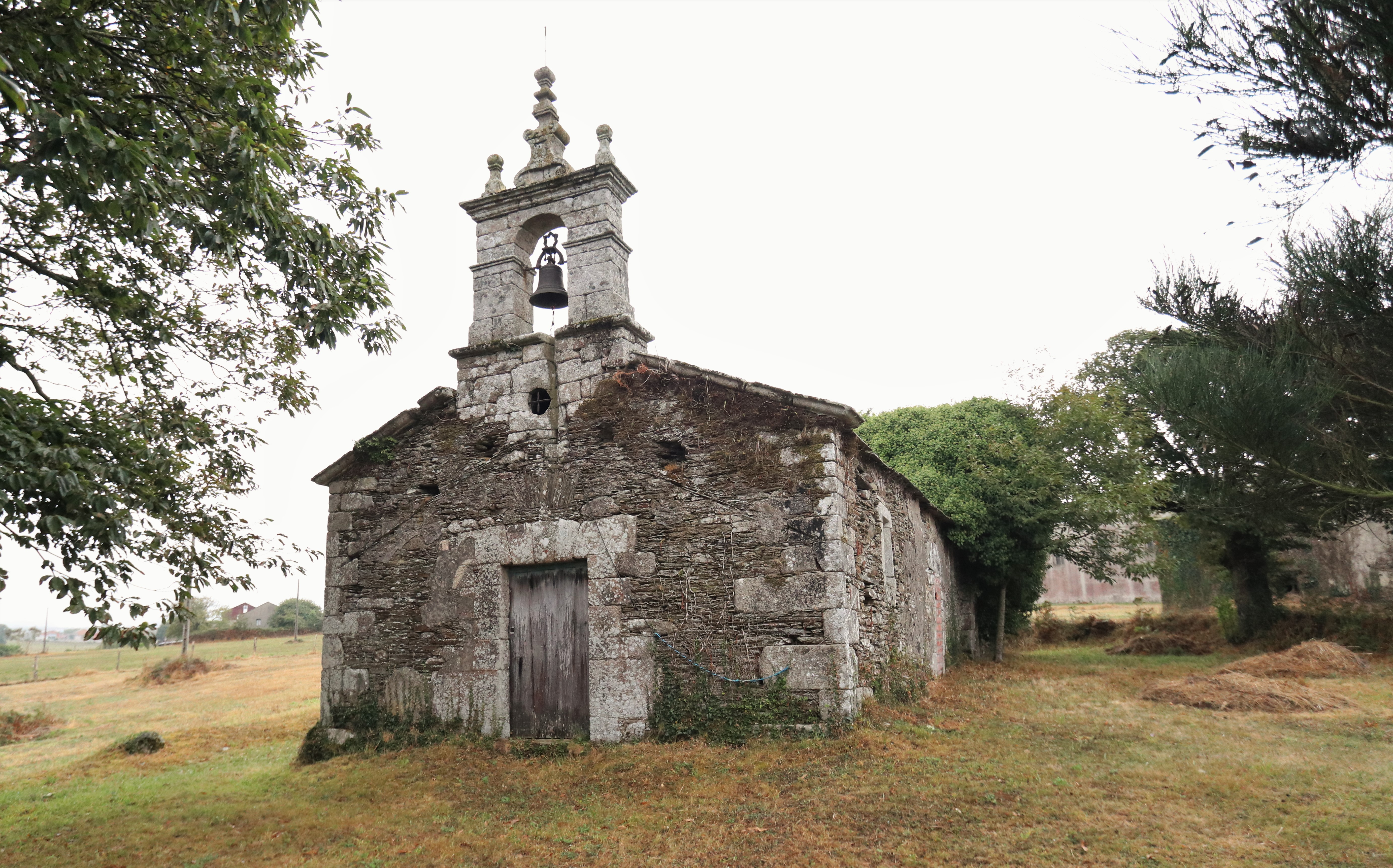 Igrexa vella de Baroncelle, Abadín.